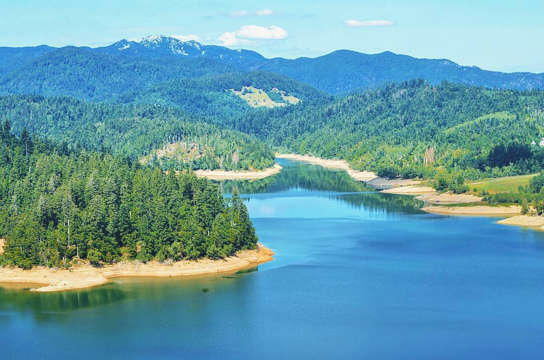 Lokvarsko jezero